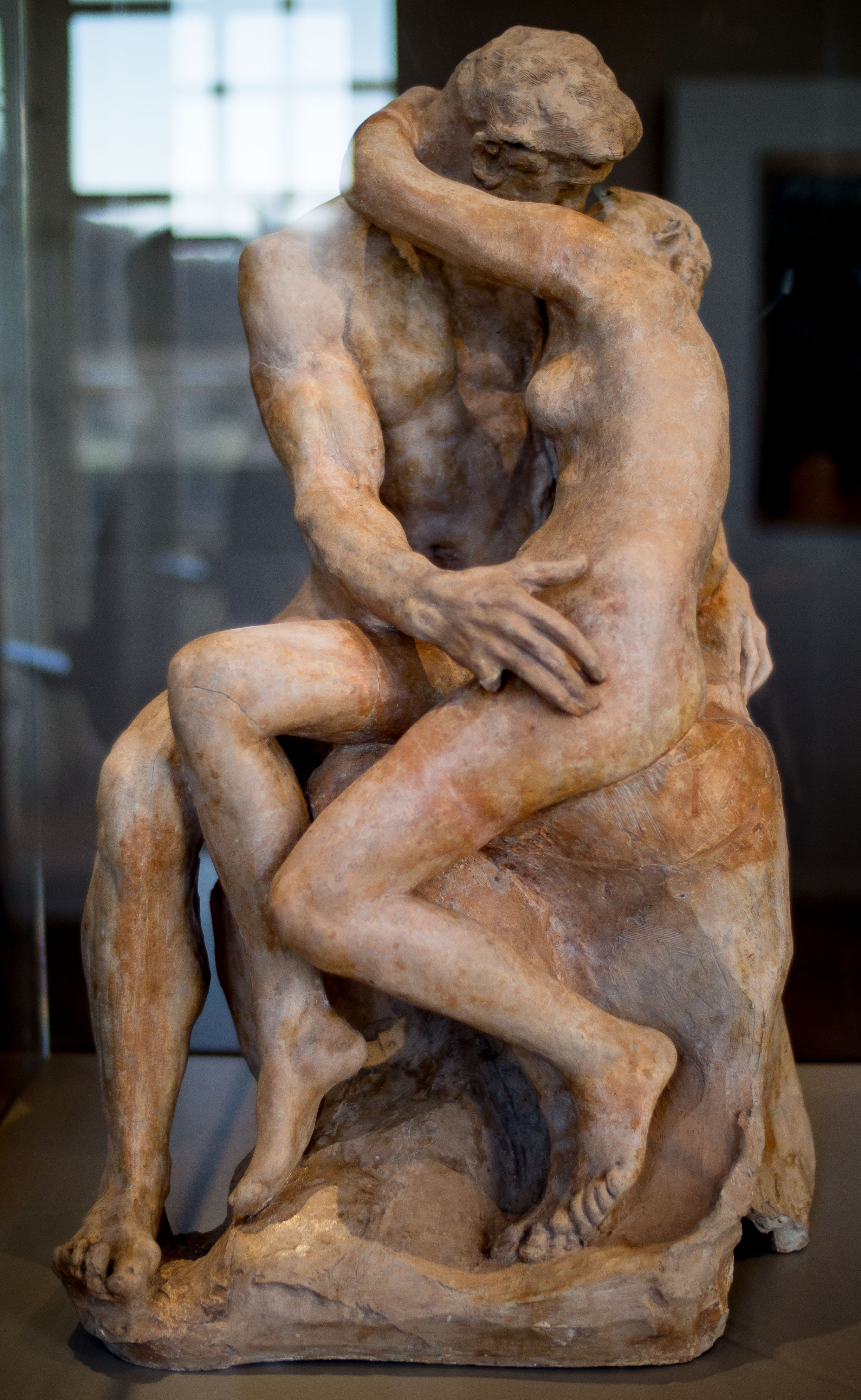 Auguste Rodin, "Le Baiser", vers 1881-1882, Sculpture (terre-cuite), Musée Rodin, Paris, France